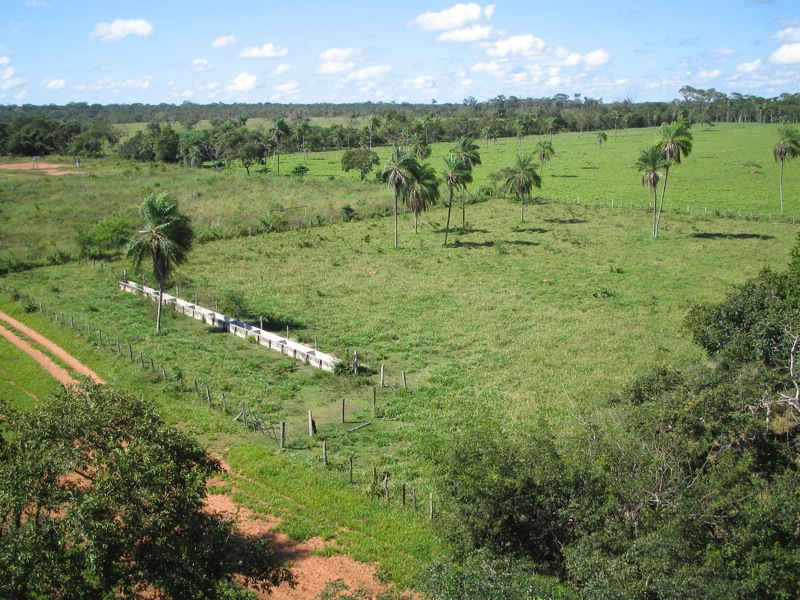 La llanura del oriente boliviano.